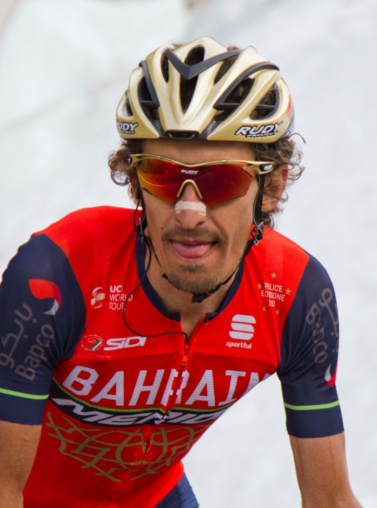 057 pellizotti